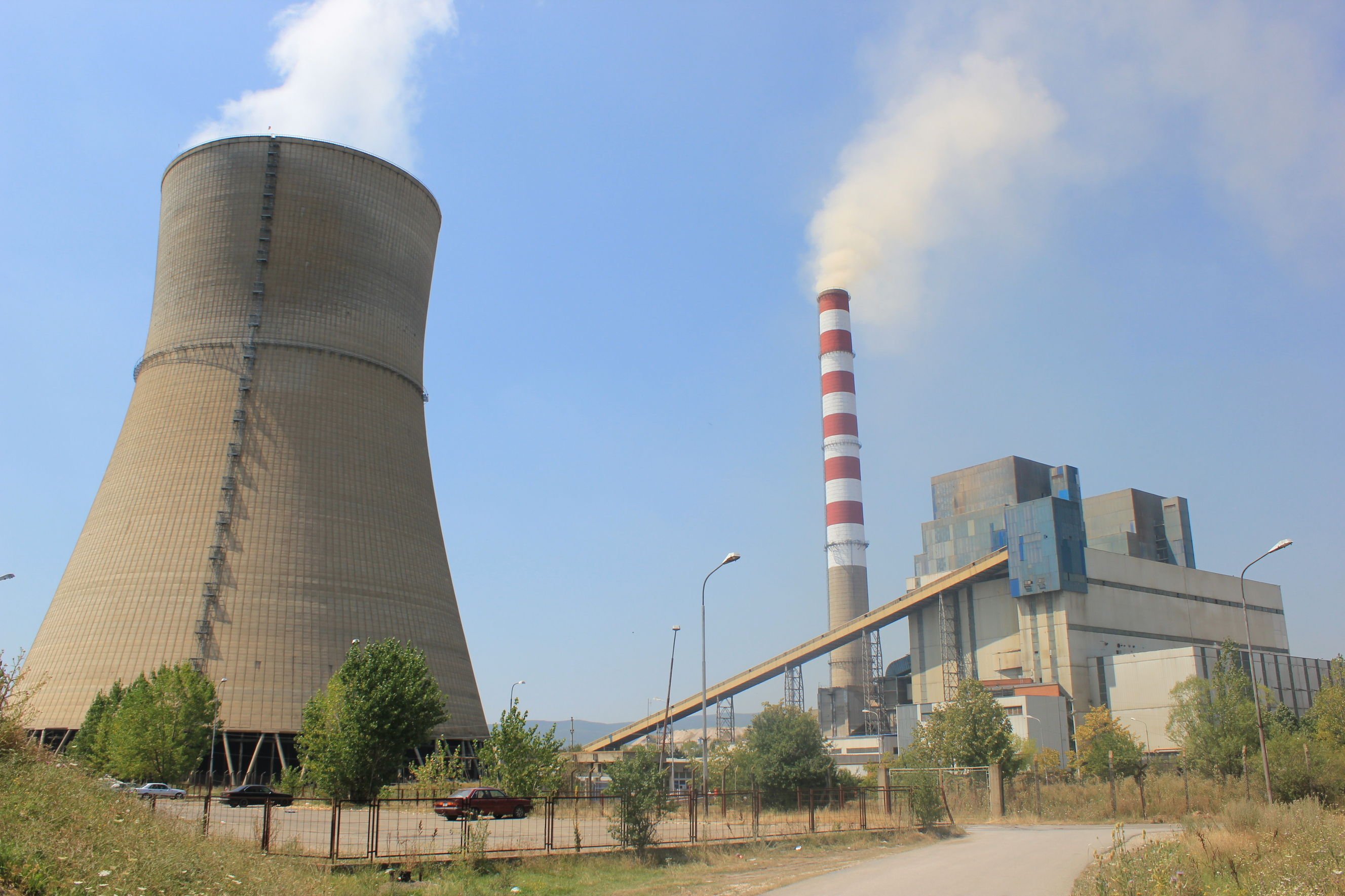 Braunkohlekraftwerk bei Obilić, Kosovo.Hornjoserbsce: Brunicowa milinarnja blisko Obilića w Kosowje.